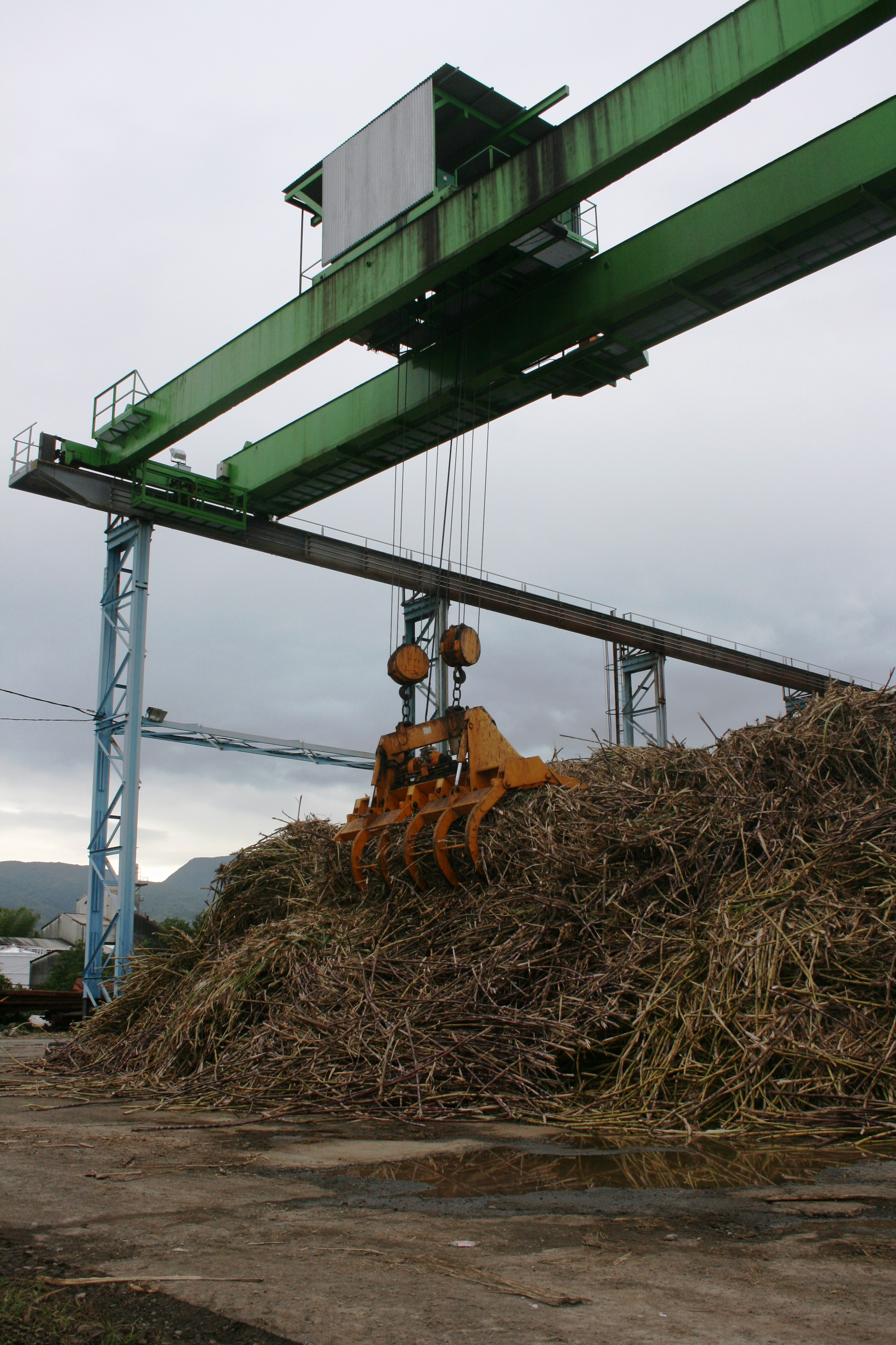 Une grue de la balance de l'usine de Beaufonds de Saint-Benoît, sur l'île de la Réunion